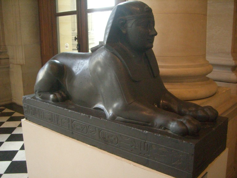 Sphinx du pharaon Néphéritès Ier trouvé à Rome, dédié à Ptah et Sokar-Osiris - Provenance initiale Memphis - XXIXe dynastie égyptienne